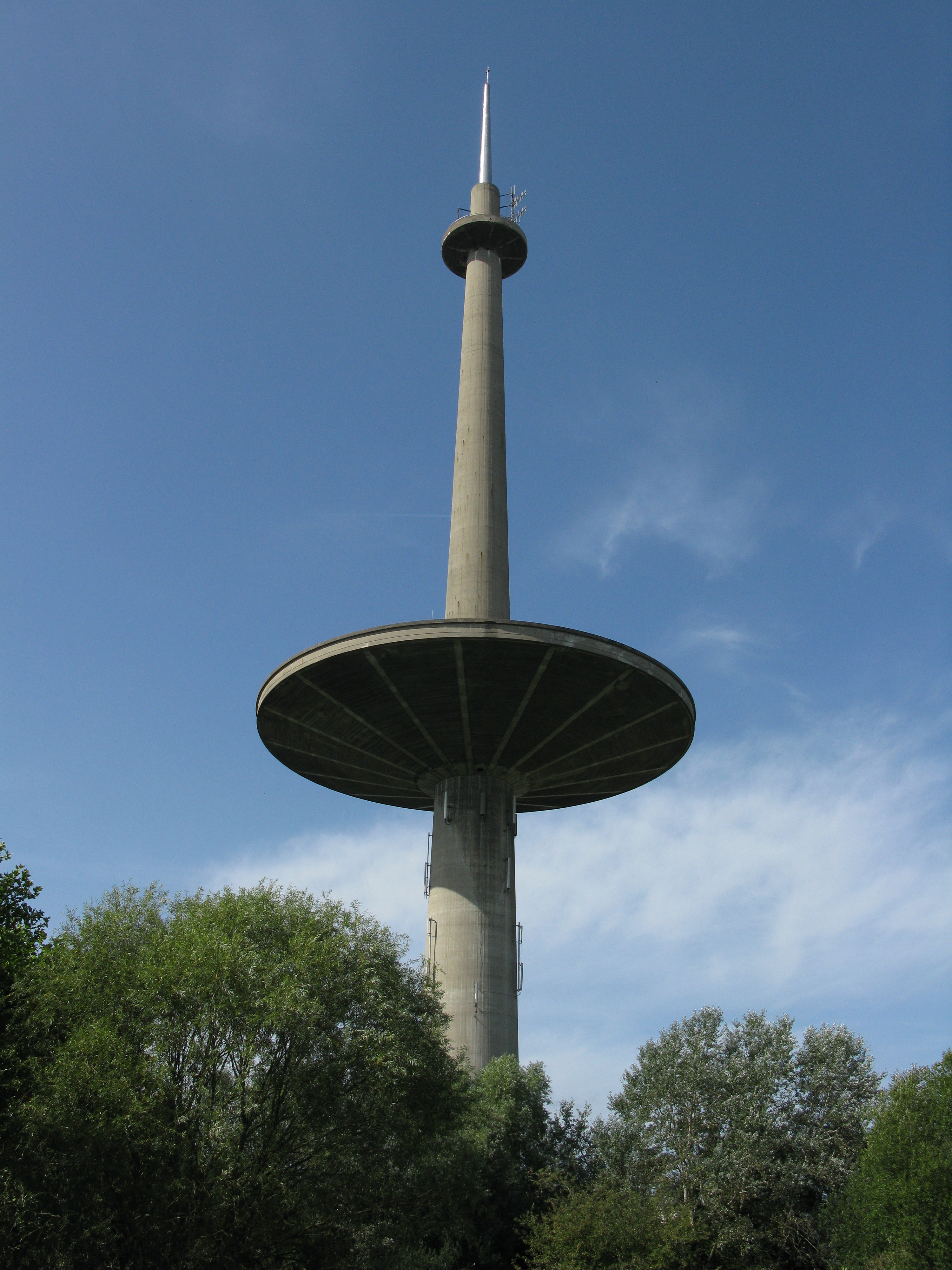 Watertoren Mechelen-Zuid (hoogste gebouw van Mechelen, hoger dan de Sint-Romboutstoren)